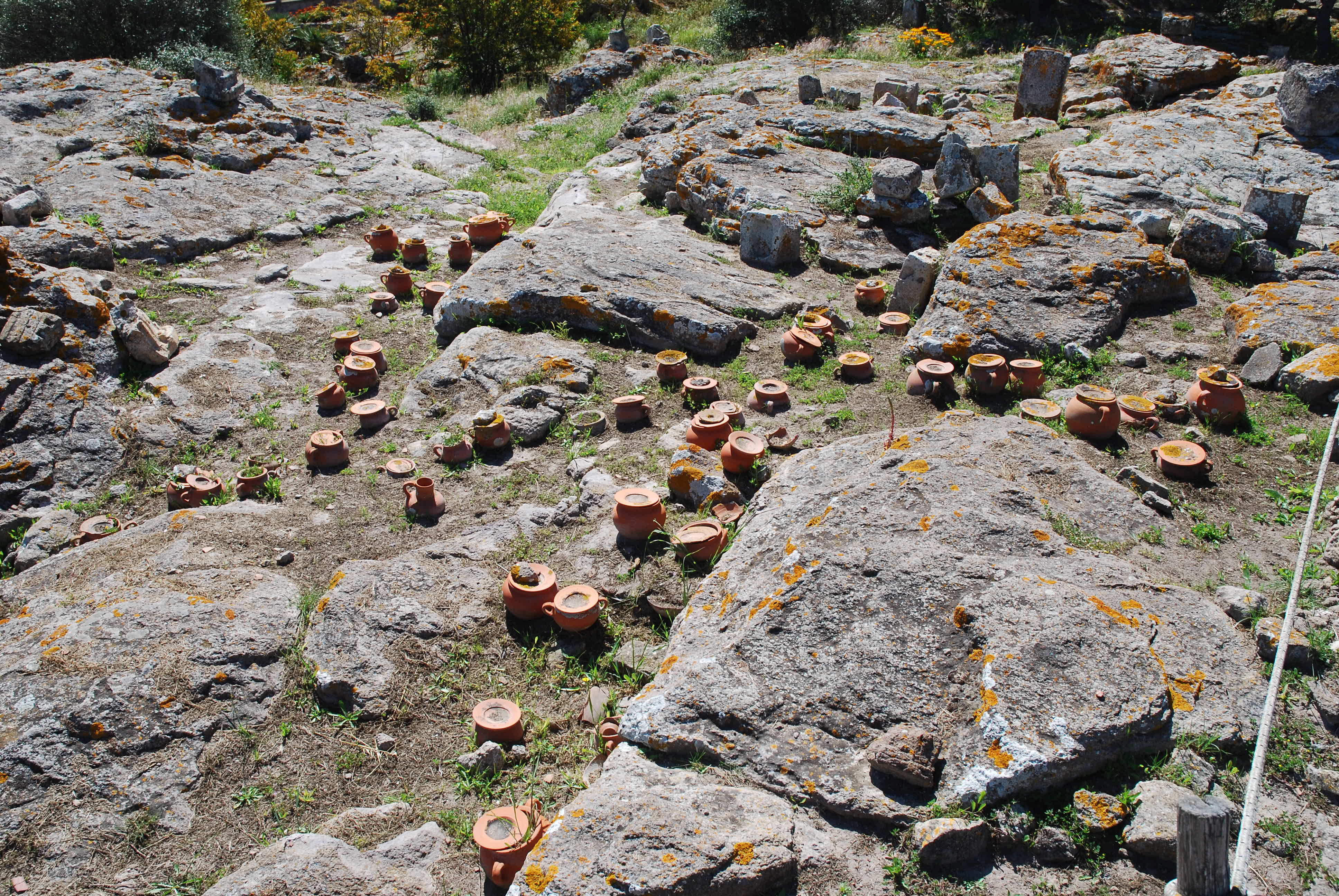 Tofet - MIBAC This is a photo of a monument which is part of cultural heritage of Italy.